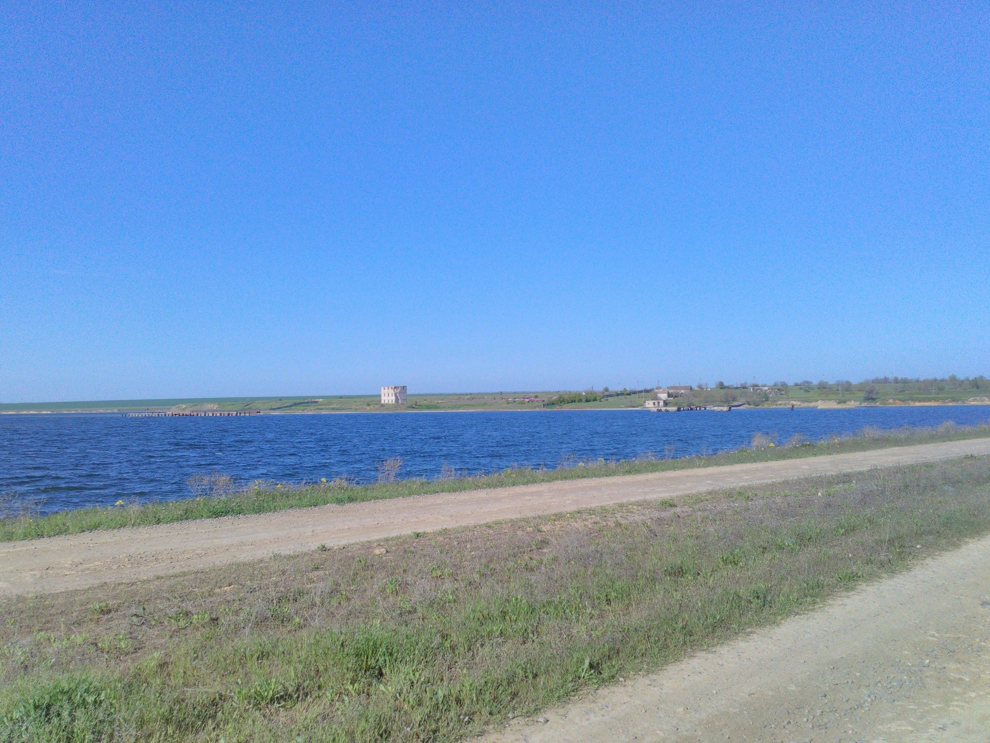 Березанський лиман. На задньому плані село Рівне.